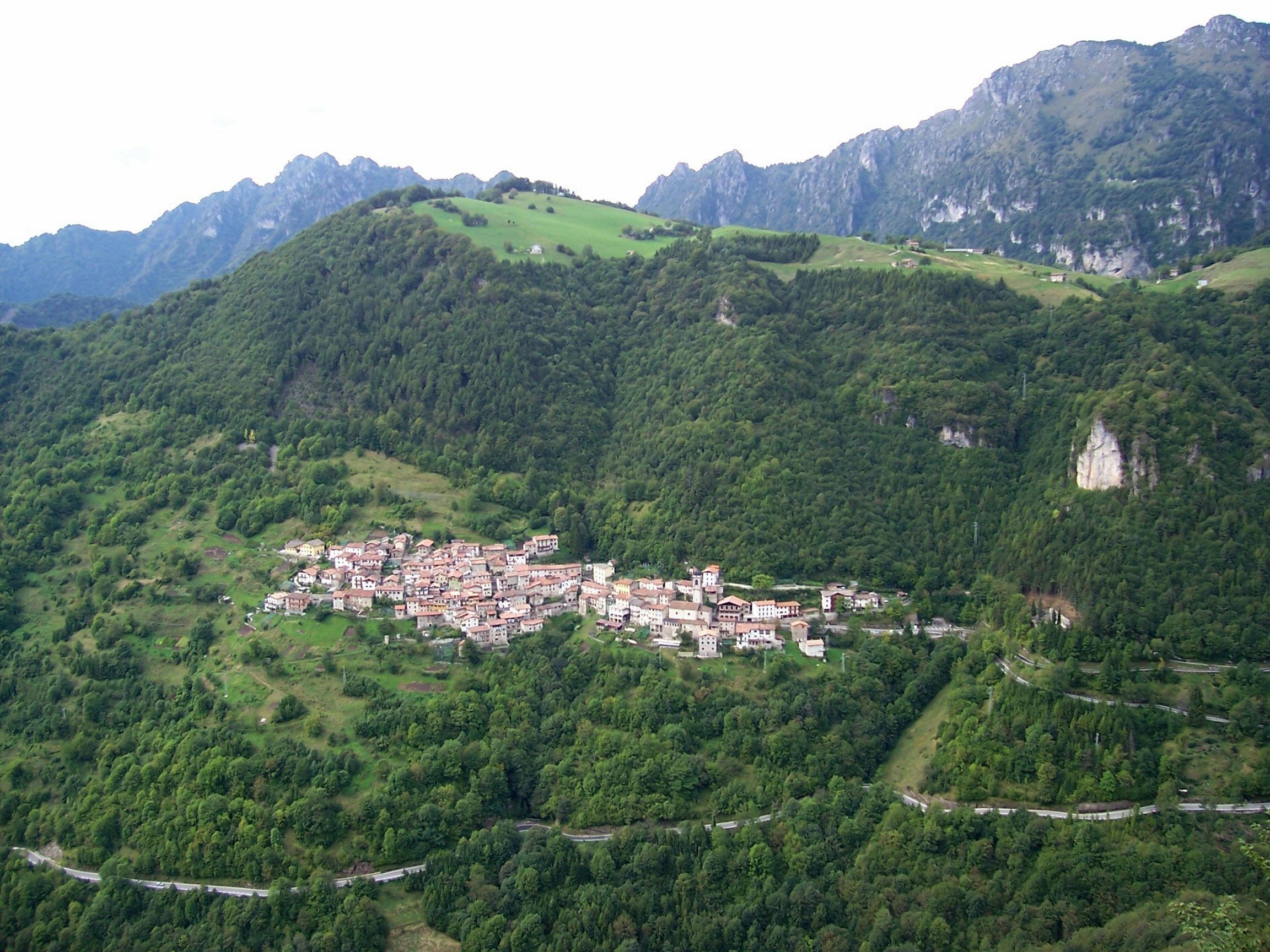 panorama di magasa